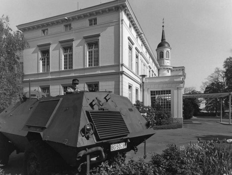 Maßnahmen und Ereignisse im Zusammenhang mit der Terrorbekämpfung in der Bundesrepublik Deutschland. Das Bundeskanzleramt gehörte zu den am schärfsten bewachten Regierungsgebäuden in Bonn. Auch die Entscheidung der Kleinen Lage und des Großen politischen Beratungskreises (Krisenstäbe) wurden hier getroffen.